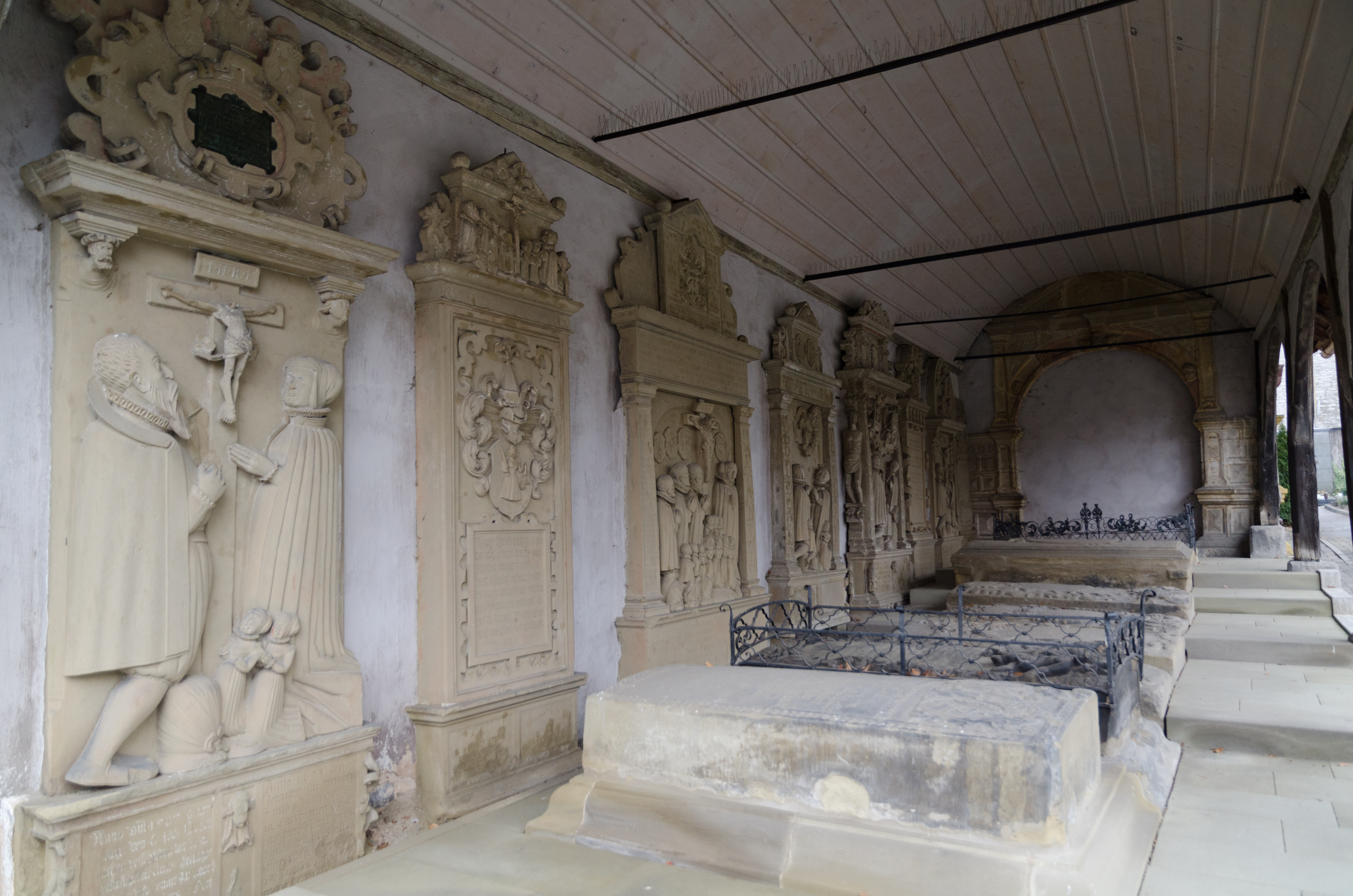 Marktbreit, Friedhof, Holzlauben